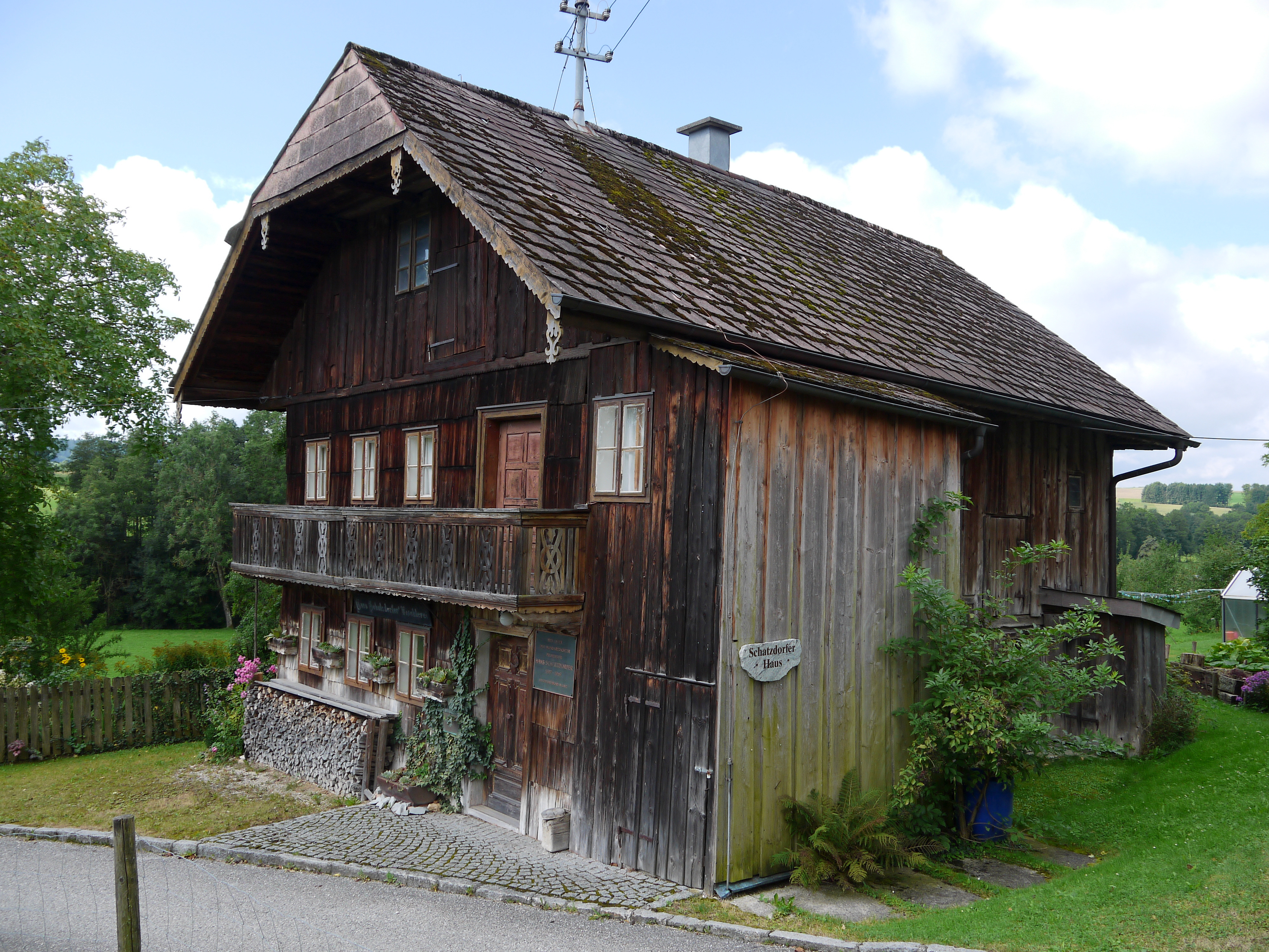 Bauernhaus, „Schatzdorferhaus“